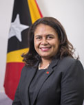 Veneranda Lemos Martins, Abgeordnete des Nationalparlaments Osttimors